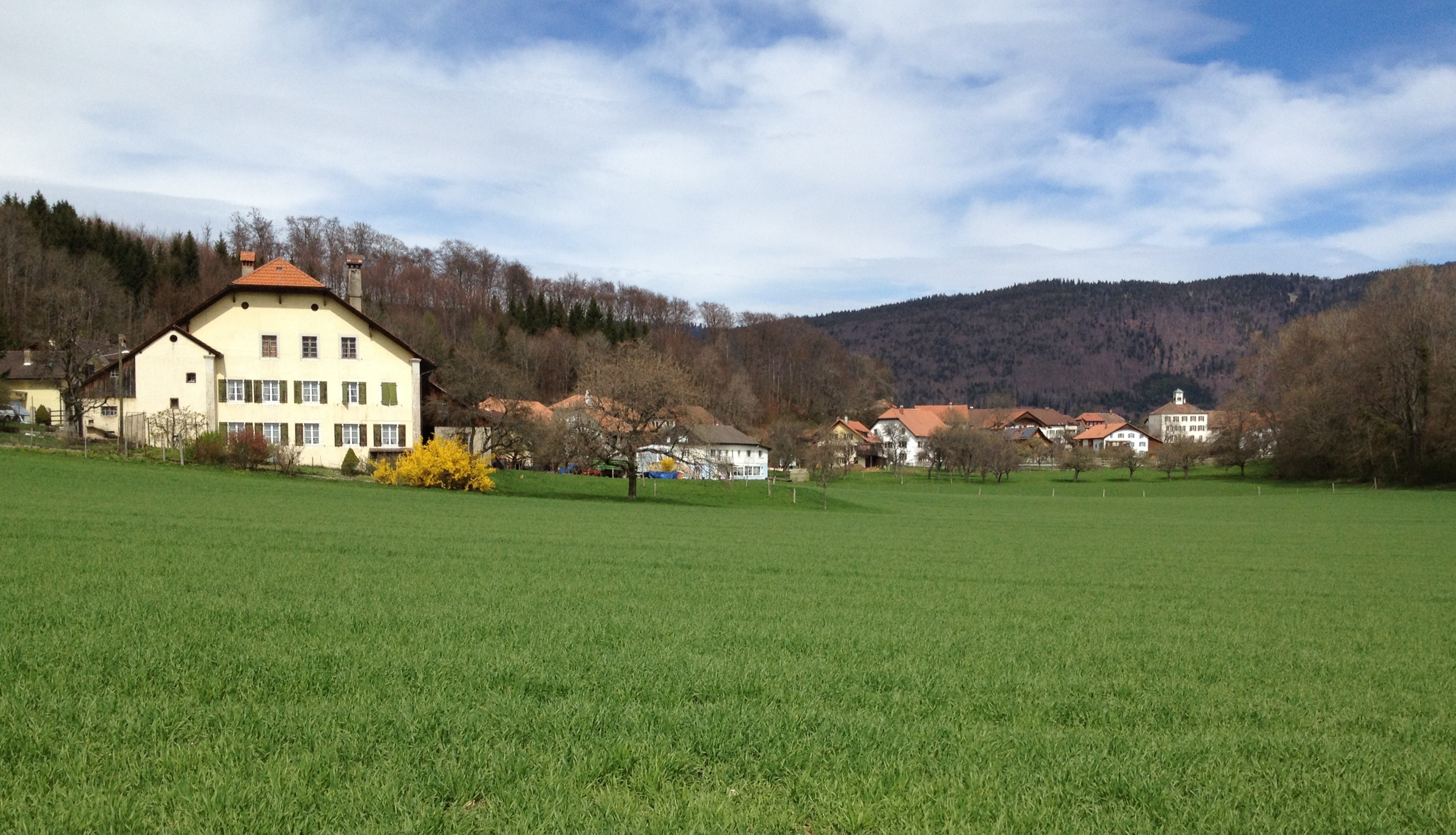 Village de Prêles, Canton de Berne, Suisse